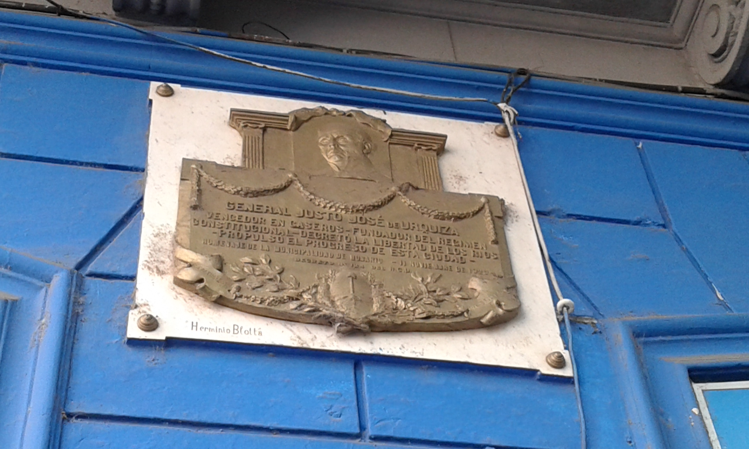 Plaqueta sobre el General Justo José de Urquiza en la calle Urquiza esquina Corrientes en Rosario, del escultor Erminio Blotta.